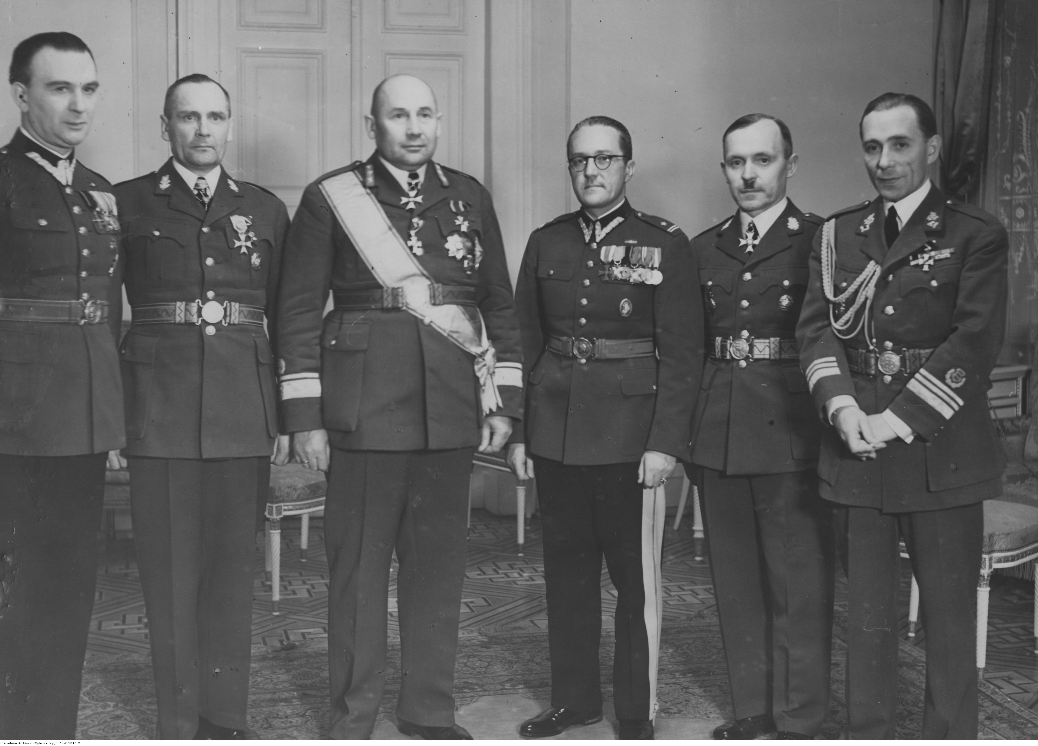 Wizyta dowódcy estońskiej straży granicznej gen. Ants'a Kurvits'a w Warszawie; 1939 r. Widoczni od lewej: kpt. Jetter, płk Paul, gen. Ants Kurvits, mjr Gurbski, ppłk Luus, płk Tombak. Koncern Ilustrowany Kurier Codzienny - Archiwum Ilustracji. Sygnatura: 1-W-1849-2